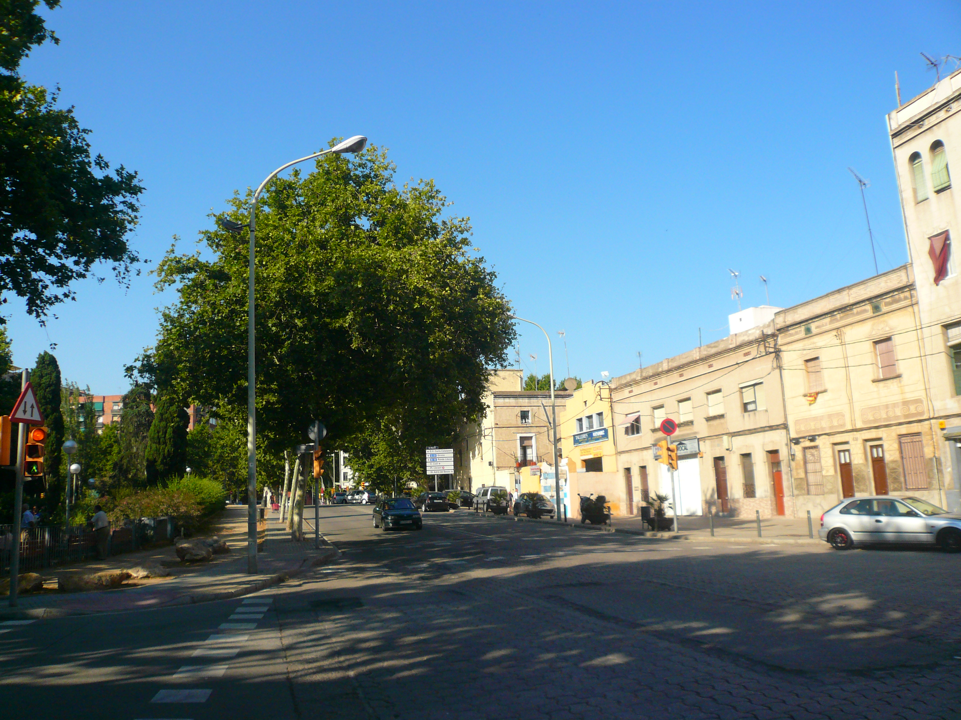 Plàtans al Poblenou. La veritat és que estava buscant els plàtans de la carretera de Mataró (que són arbres d'interès local) seguint el mètode de fotografiar primer i mirar el mapa després. Així vaig acabar amb fotos d'alguns bonics plàtans del Poblenou que no són arbres protegits però que sempre poden ser útils a Commons.